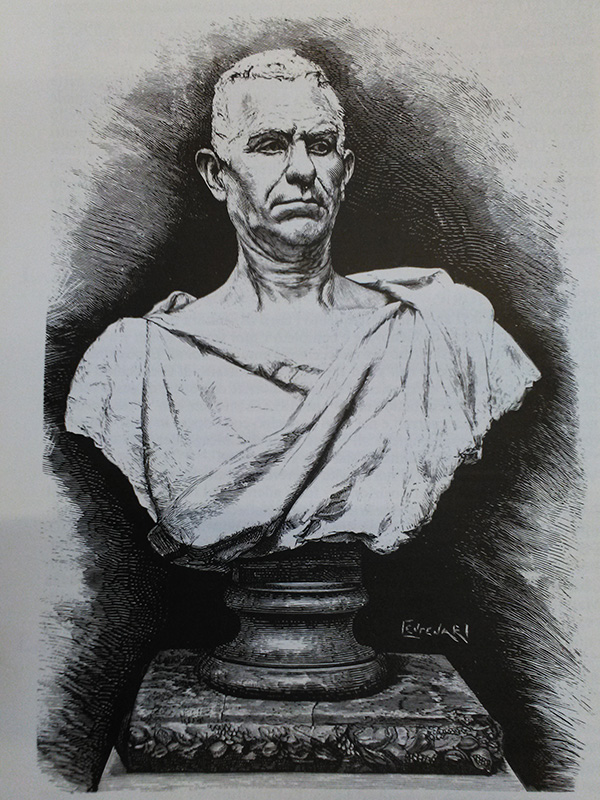 Busto di Senatore romano dello scultore Adolfo Laurenti pubblicato sull'Illustrazione Italiana in occasione dell'Esposizione di Torino del 1880